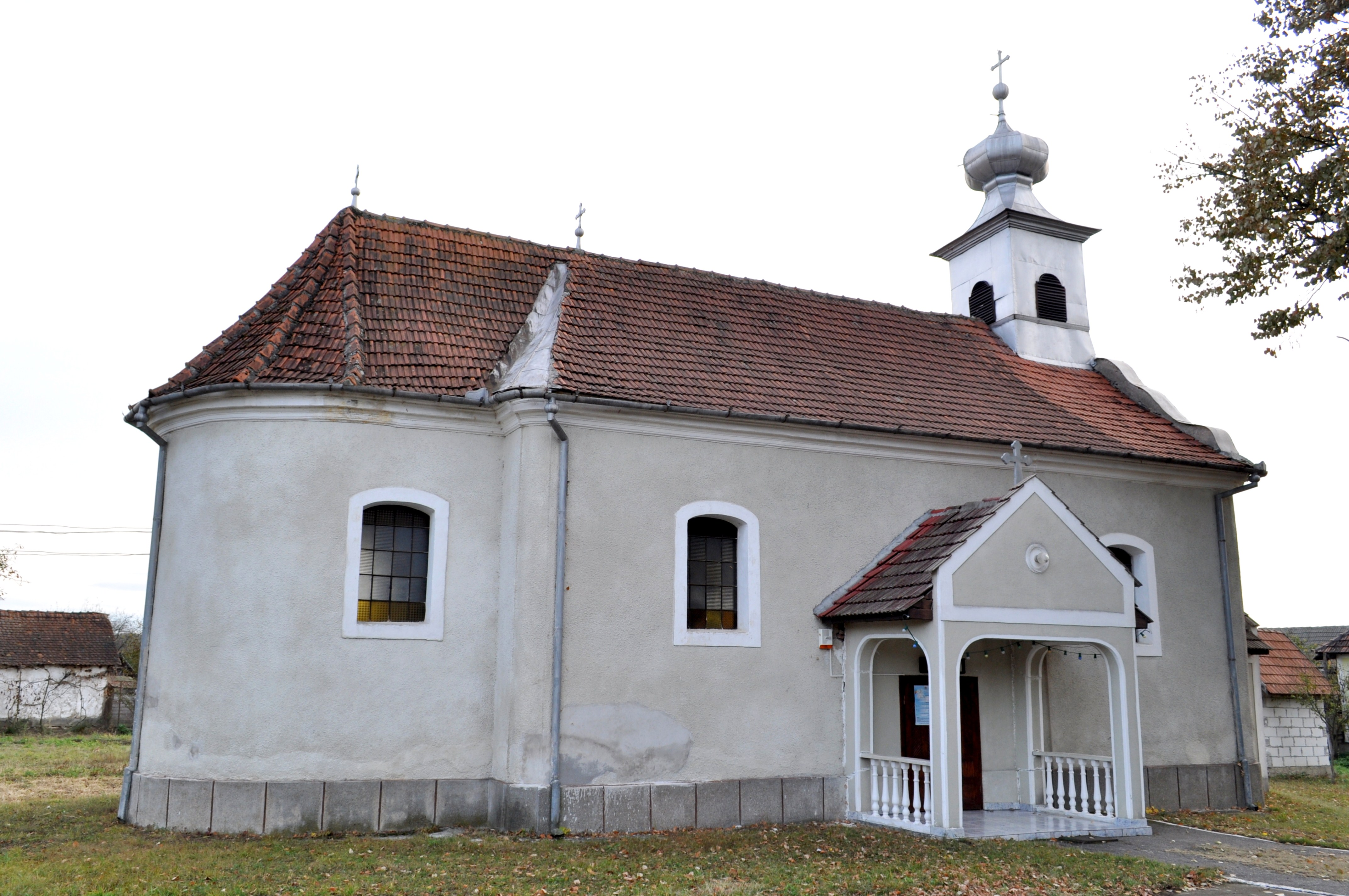 Sâmbăta, județul Bihor